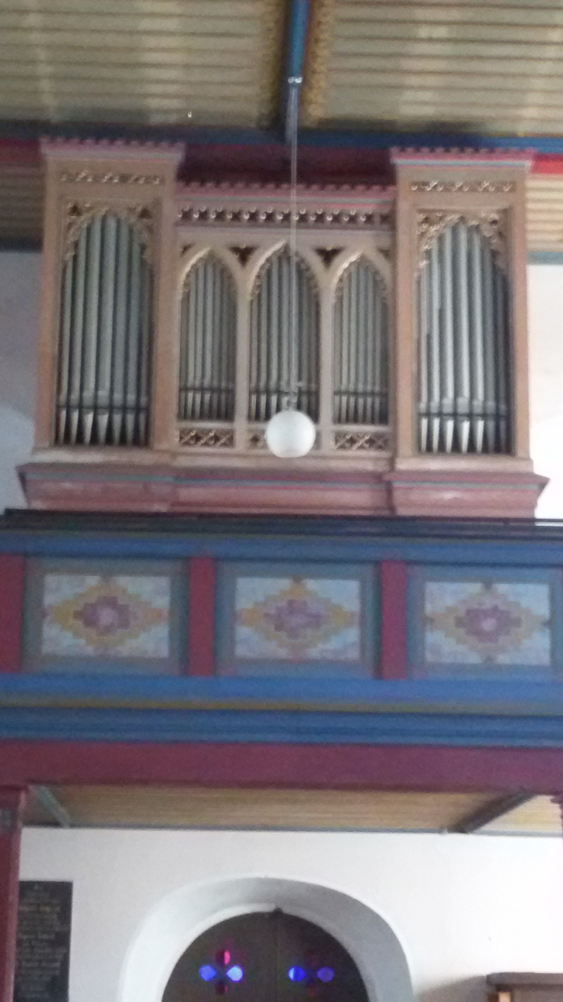 Orgel Ansicht aus der Kirche